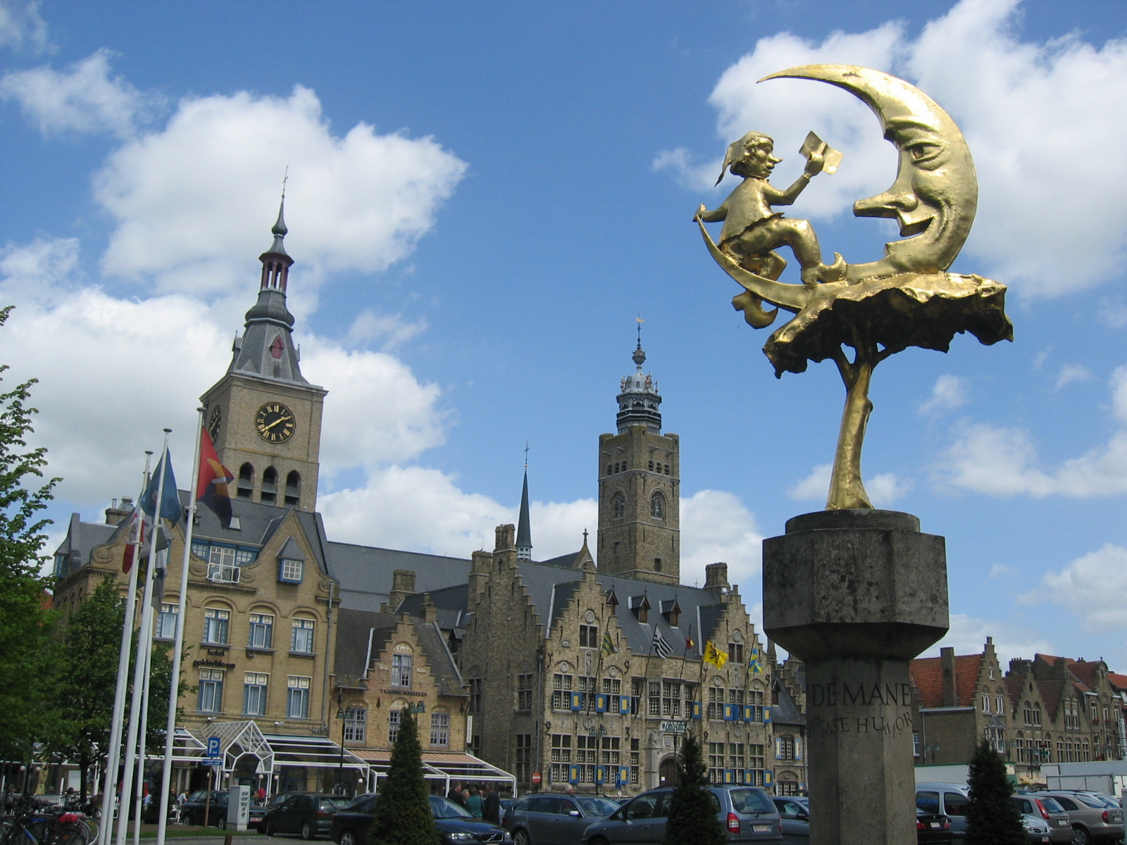 Royalty-free. Picture taken by Wikipedia (VLS)-author Astro. Beeld "Het Manneke uit de Mane" op de Grote Markt van Diksmuide.